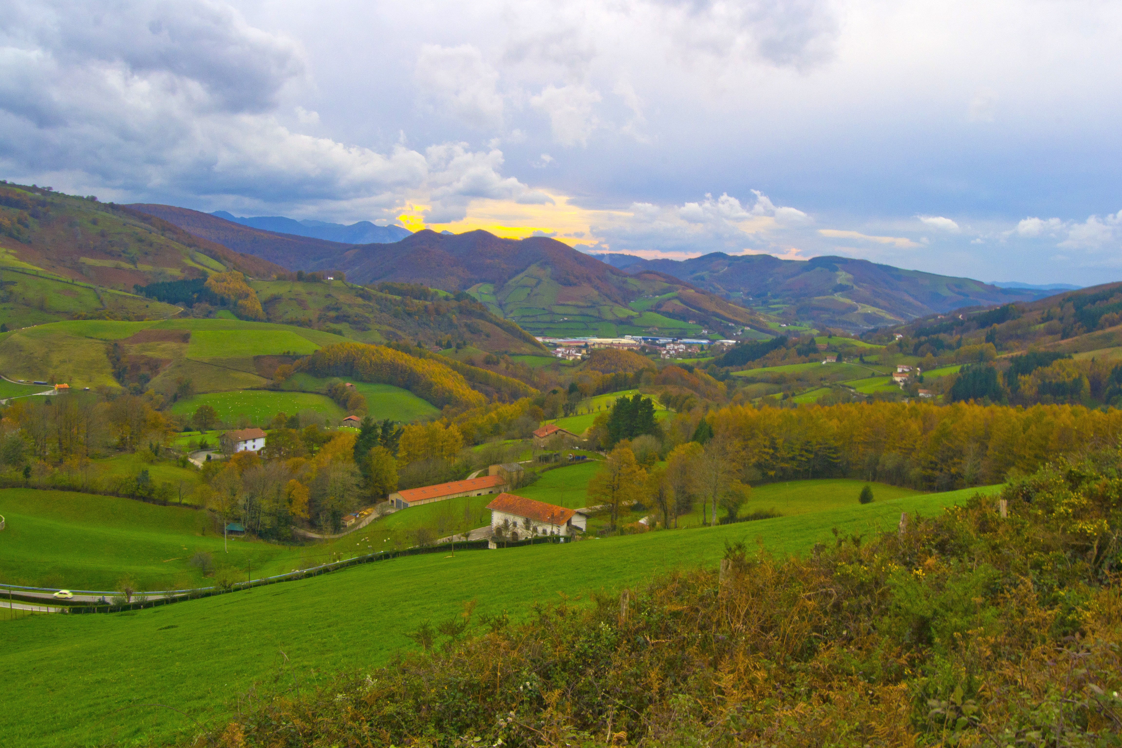 Leitza udalerria Usategieta mendigainetik ikusita (Leitzako edo Ezkurrako mendigaina). Nafarroa, Euskal Herria. Leitza village from Usategieta pass (Leitza or Ezkurra pass). Navarre, Basque Country.